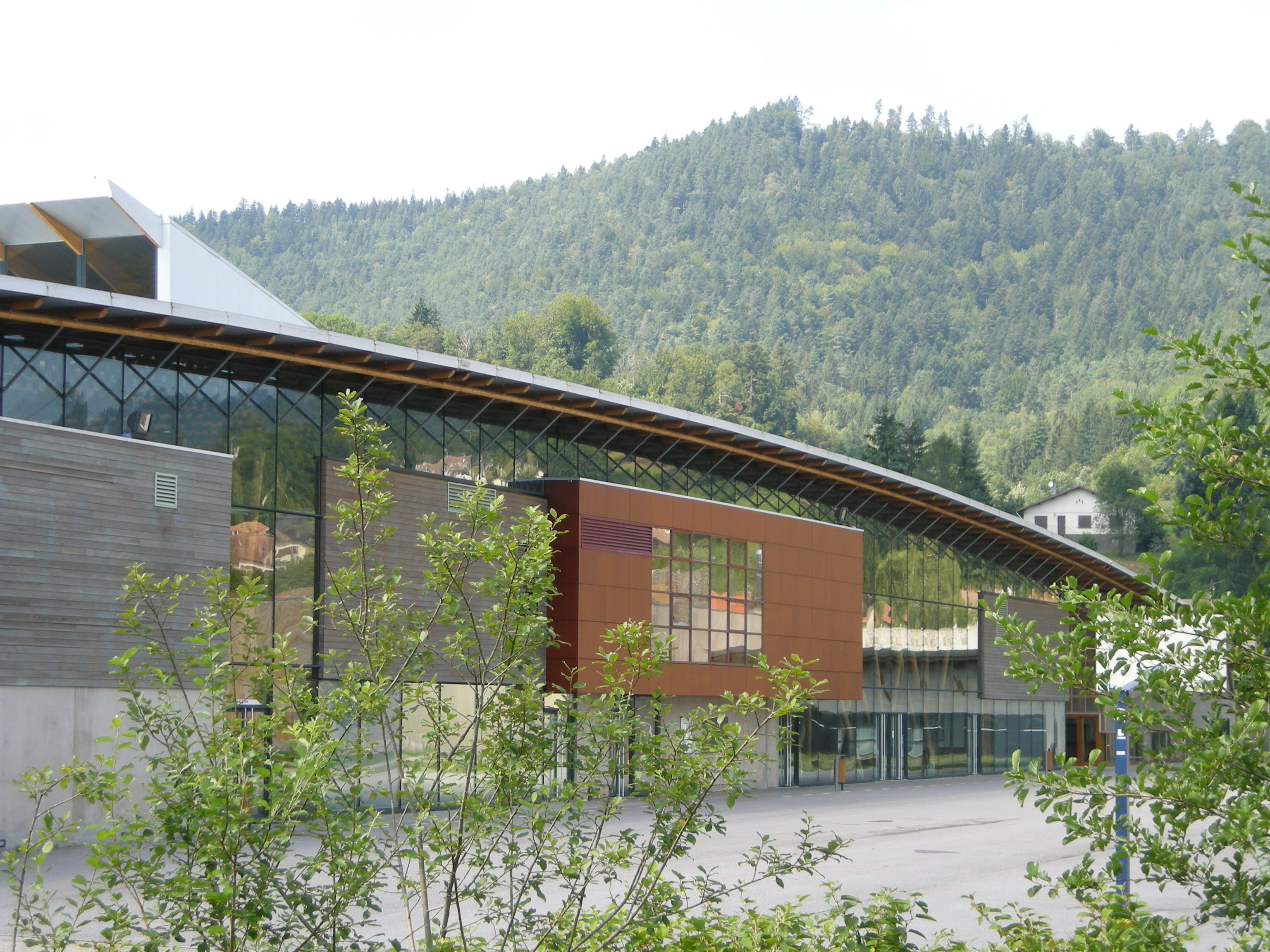 Collège André Malraux à Senones (Vosges, France)